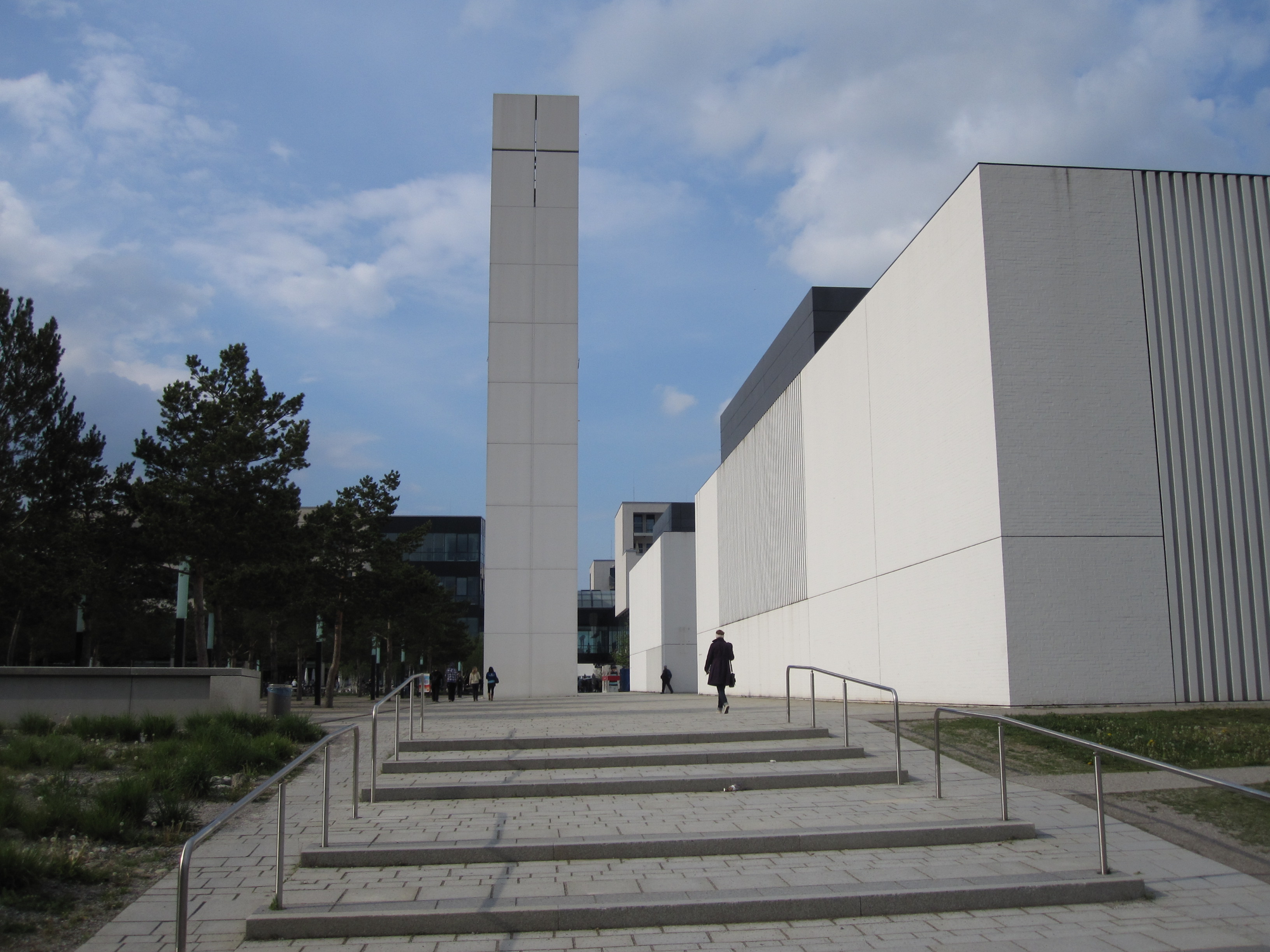 Kirchenzentrum München-Riem, Architekt: Florian Nagler